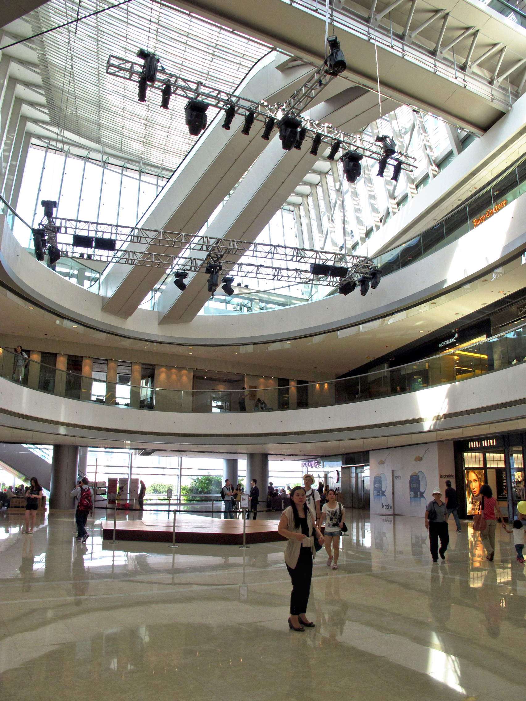 ifc mall Void